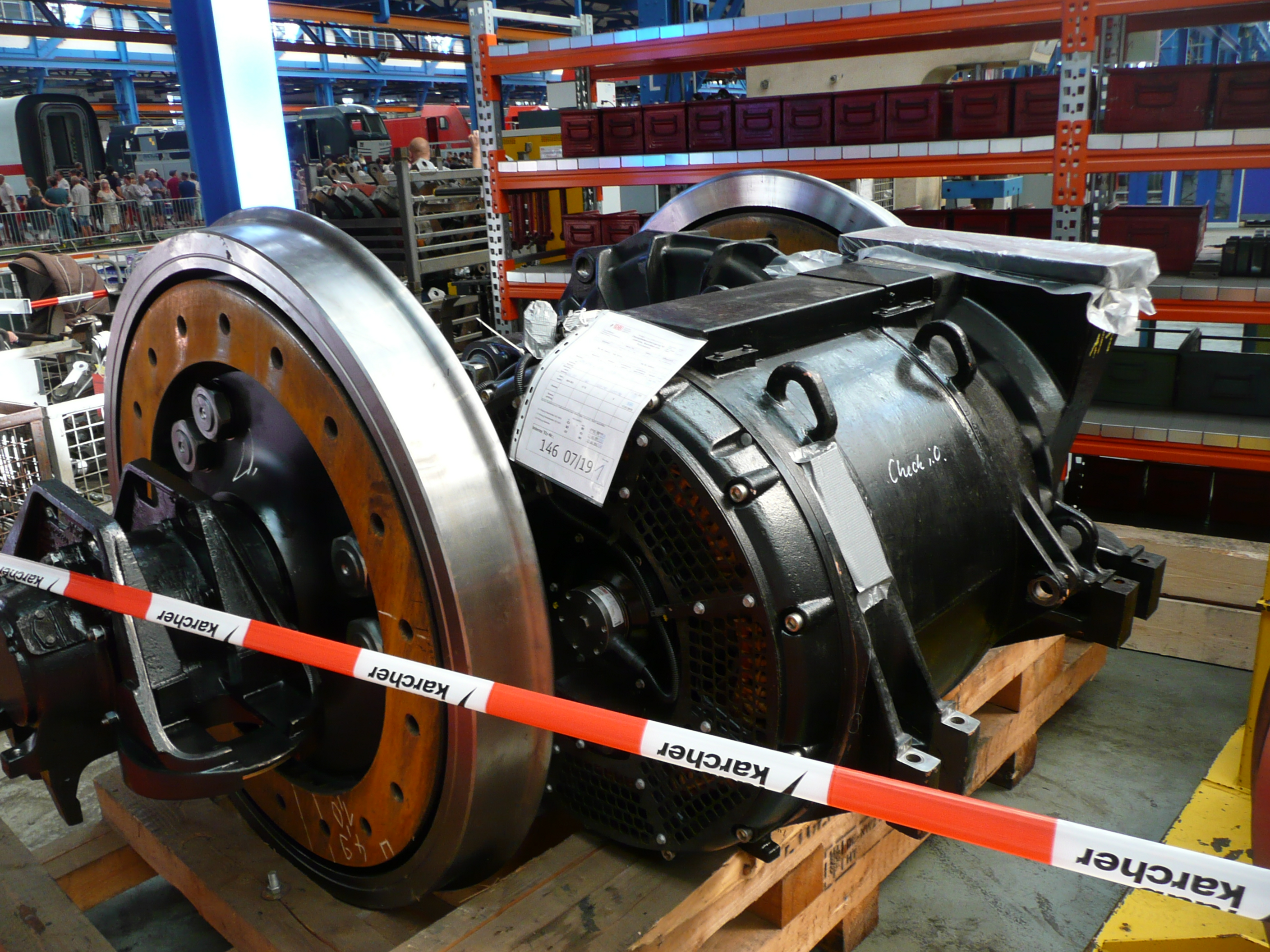 Kompletter Fahrmotor der BR 146 im AW Dessau